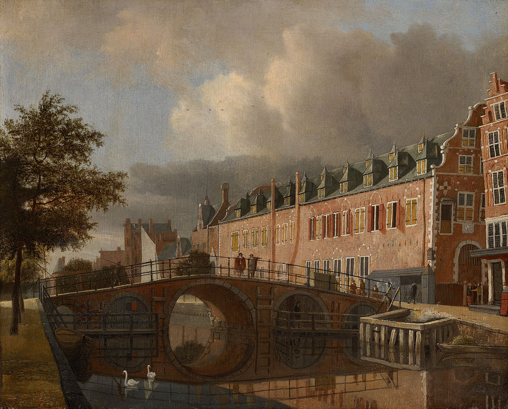 De Kloveniersburgwal met het Bushuis gezien in de richting van de Amstel, schilderij; Verenigde Oostindische Compagnie; stadsgezicht; stadsgezicht Amsterdam; Bushuis; Kloveniersburgwal; Oude Hoogstraat; Swijgh Utrecht